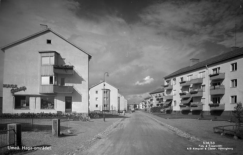 Hagaområdet.; Bostadsbebyggelse; Byggnadsverk; Miljöer; Stadsmiljö